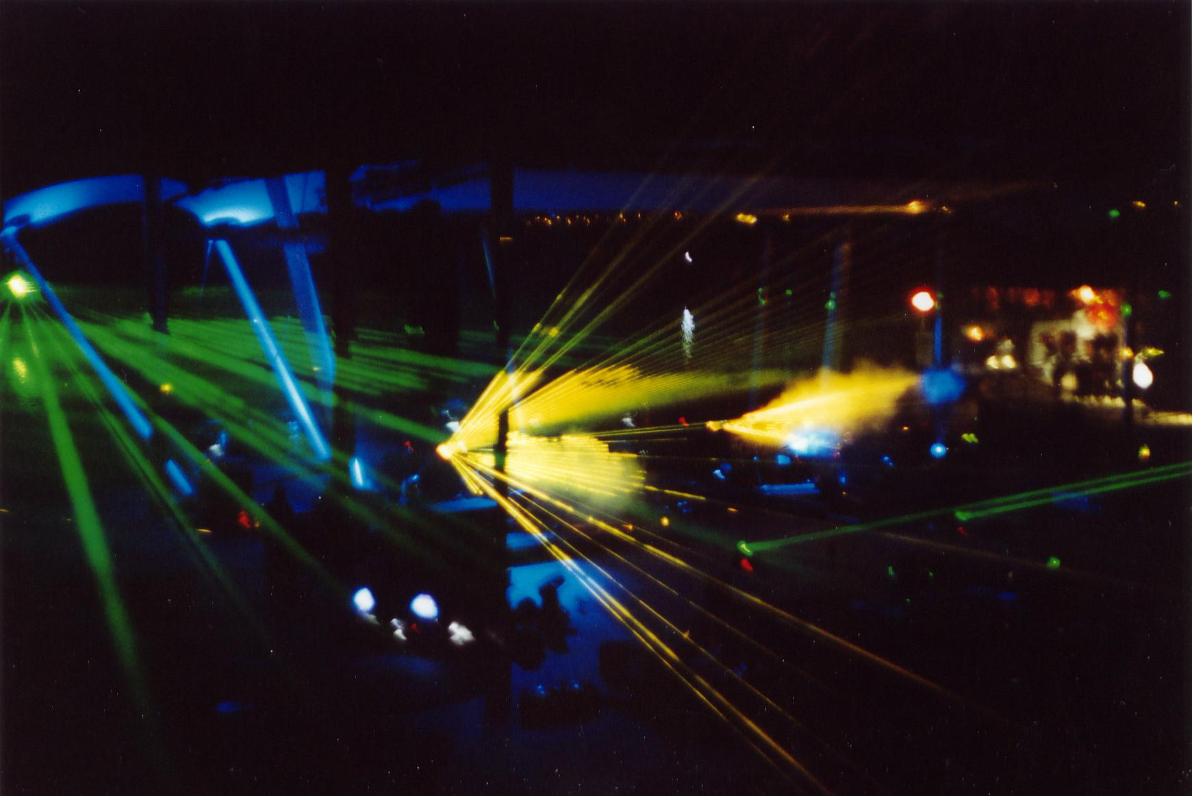 Lasershow im Amhitheater Gelsenkirchen bei der Nacht der Industriekultur